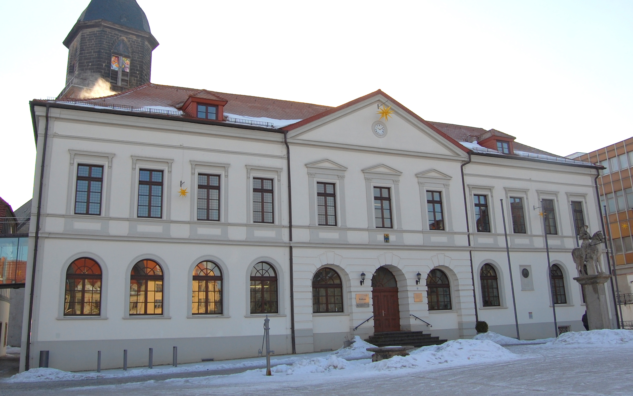 Rathaus Haldensleben im Winter